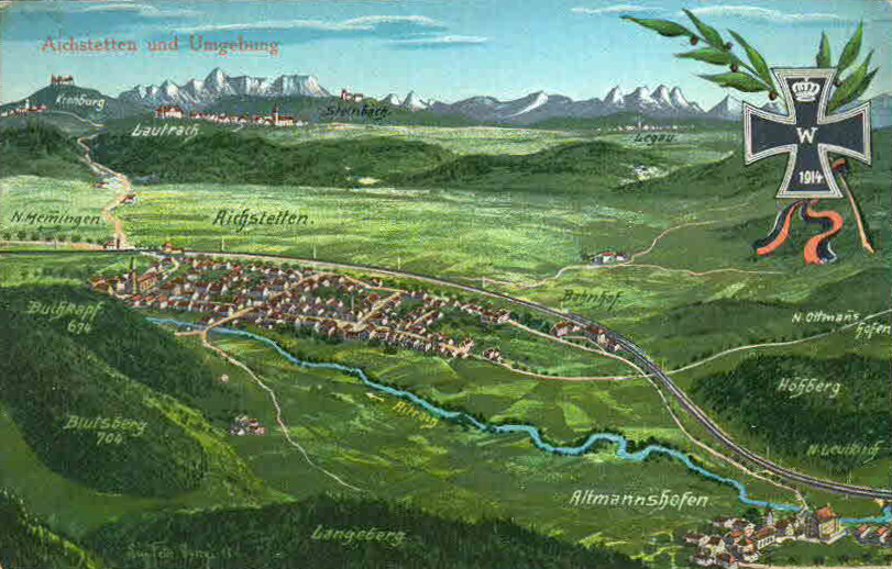 Ansichtskarte von Eugen Felle; Technoseum (Landesmuseum für Technik und Arbeit Mannheim) Motiv: Aichstetten und Umgebung